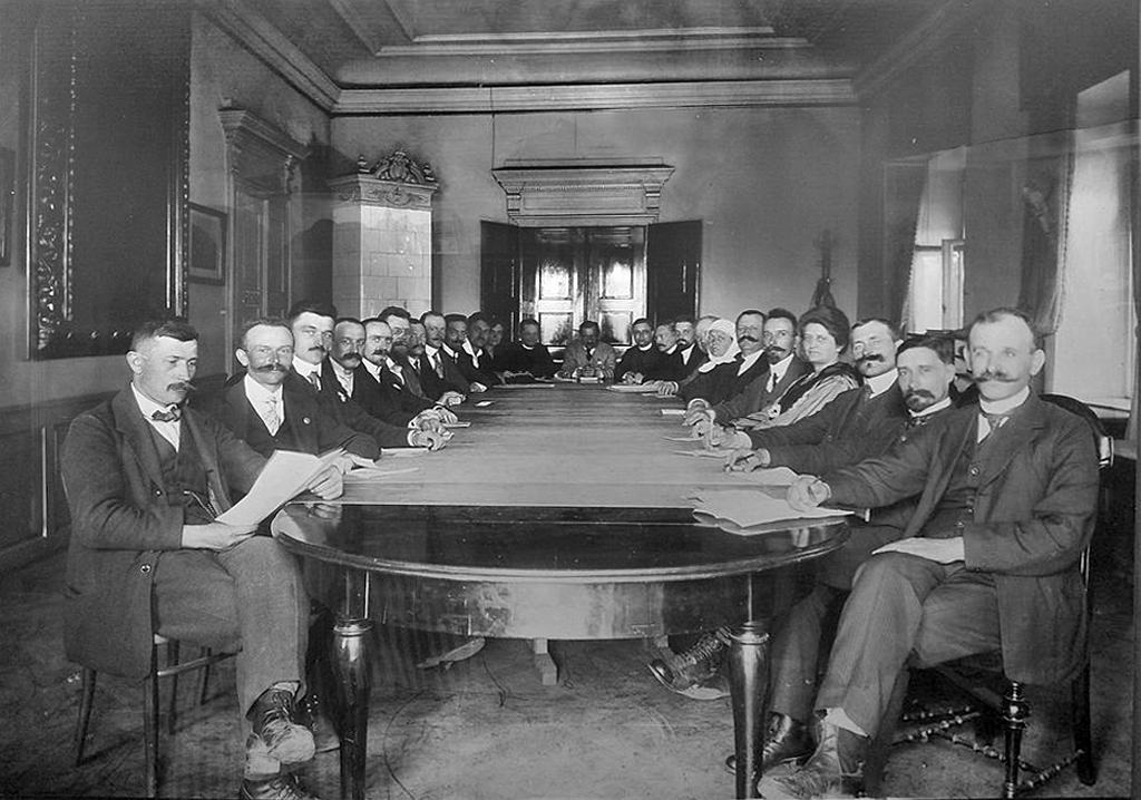 Muzeum Śląska Cieszyńskiego, Rada Narodowa Księstwa Cieszyńskiego. Zdjęcie z posiedzenia RNKC w pełnym składzie w 1920 r.